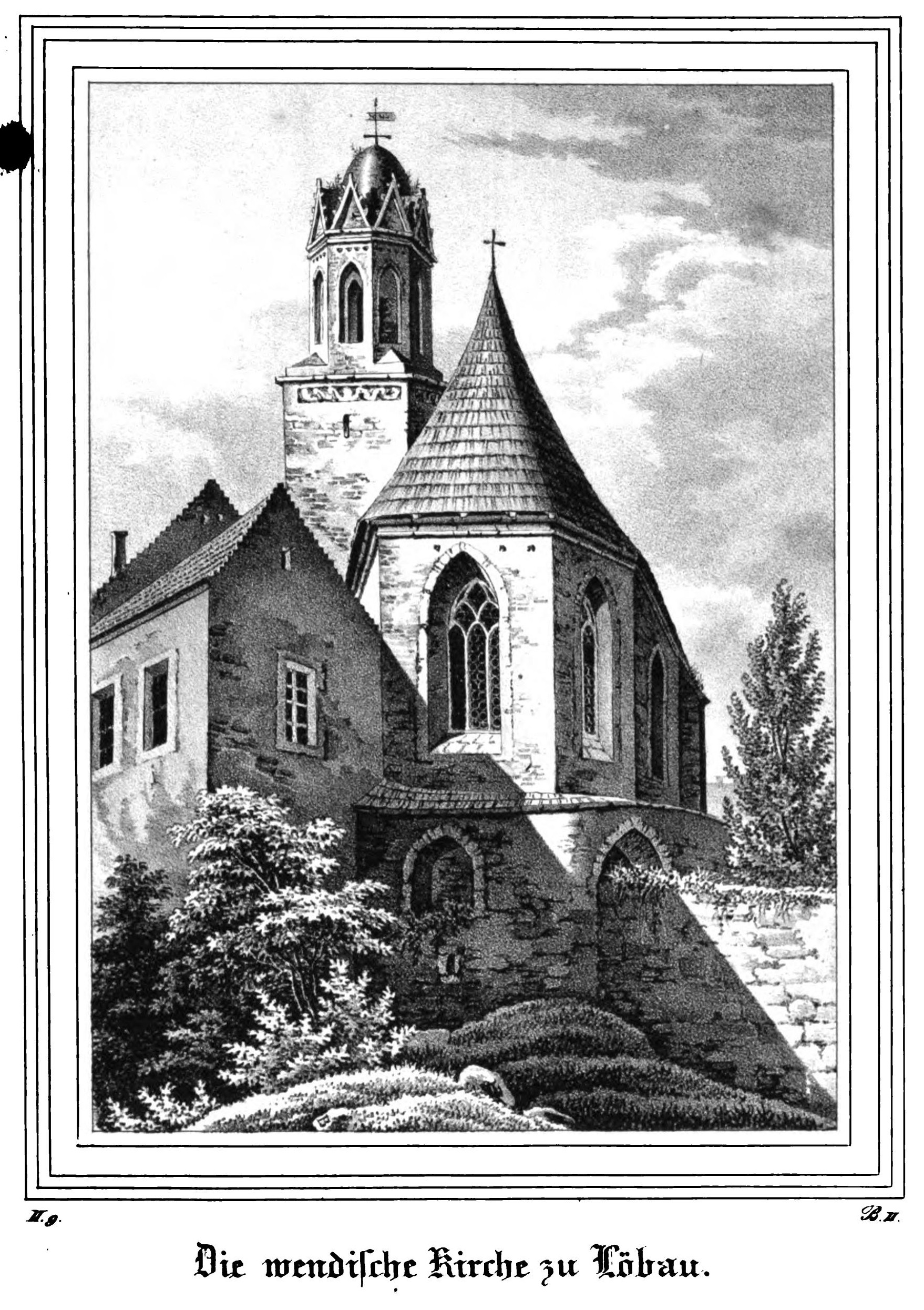 Saxonia Museum für saechsische Vaterlandskunde. Band 2. Dresden: Pietzsch und Comp. Siehe File:Saxonia Museum für saechsische Vaterlandskunde II.djvu